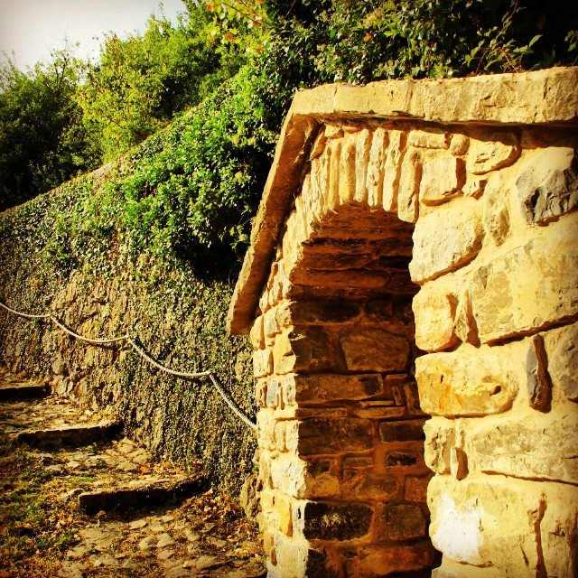 Fuente El Tinte. (foto Instagram)